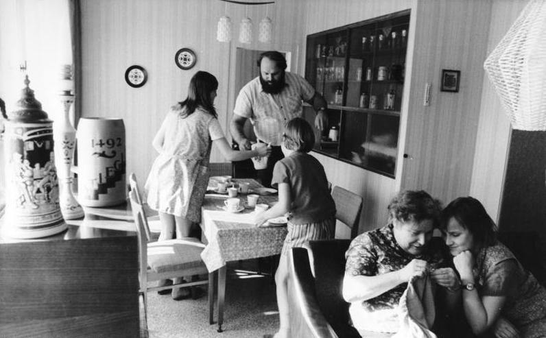 Berlin, Leninallee, Einzug in Neubauwohnung ADN-ZB/Junge/6.7.74/Berlin: Glückliche Mieter einer Neubauwohnung in der Leninallee sind Dorothea und Egon Meinel und ihre drei Kinder Kerstin (13), Cornelia (11) und Michael (8). Dorothea Meinel ist in der Konsumbauarbeiterversorgung auf der Baustelle Fennpfuhl tätig. Ihr Ehemann Egon ist Bohrwerksdreher und Mitglied einer sozialistischen Brigade im Werkzeugmaschinenkombinat "7. Oktober". Er wurde bereits viermal als Aktivist ausgezeichnet und einmal mit dem Titel "verdienter Aktivist" geehrt. In der neuen Wohnung haben auch die Sammelstücke seines Hobbys - alte Bierkrüge - ihren Platz gefunden. Im Neubaugebiet Leninallee/Weißenseer Weg werden nach Bauabschluß (1978) etwa 50 000 Bürger wohnen. N0806-015 Information added by Wikimedia users. Das Bild zeigt das Wohnzimmer einer Wohnung des Plattenbautyps P2. Typisch ist die verglaste Durchreiche (rechts hinten) zur Küche.